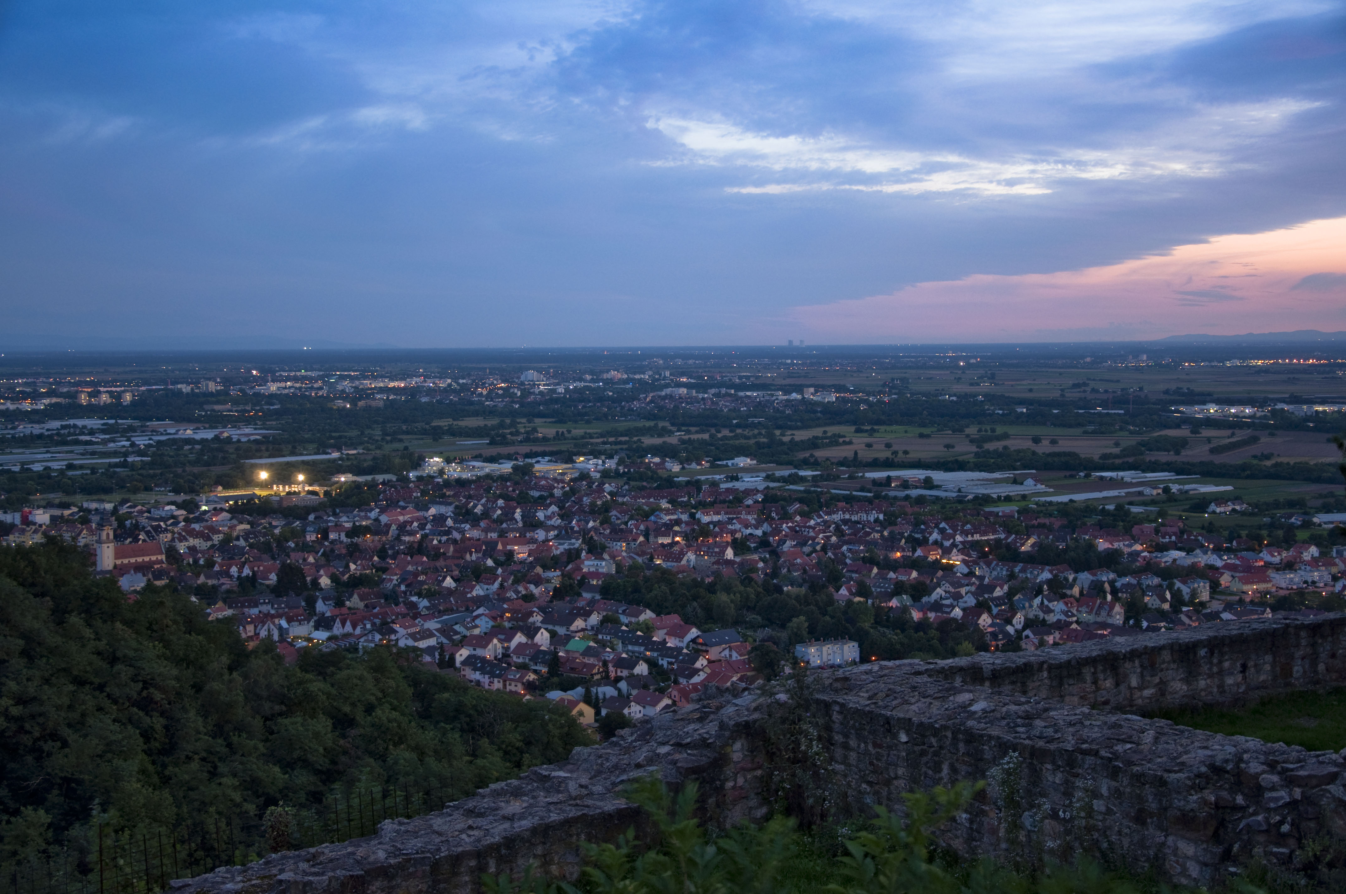 Blick von der Schauenburg Dossenheim